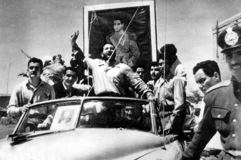 شعبان جعفری معروف به شعبان بی مخ در کودتای ۲۸ مرداد ۱۳۳۲